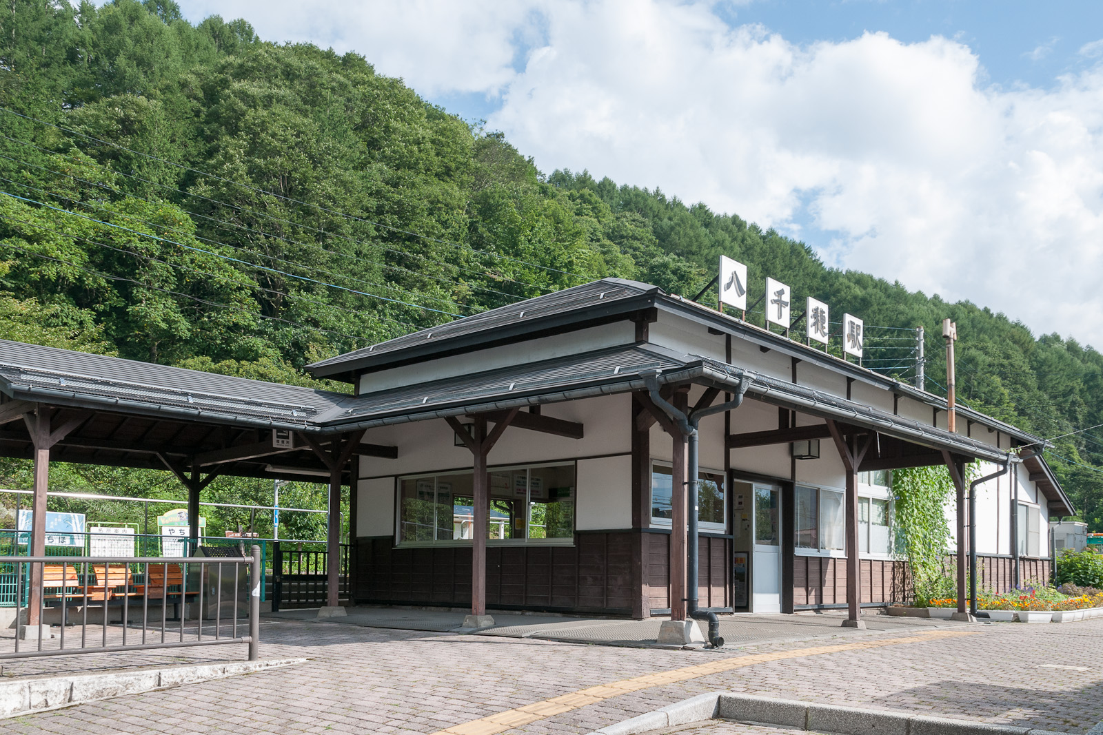 JR東日本小海線八千穂駅、長野県南佐久郡佐久穂町穂積。